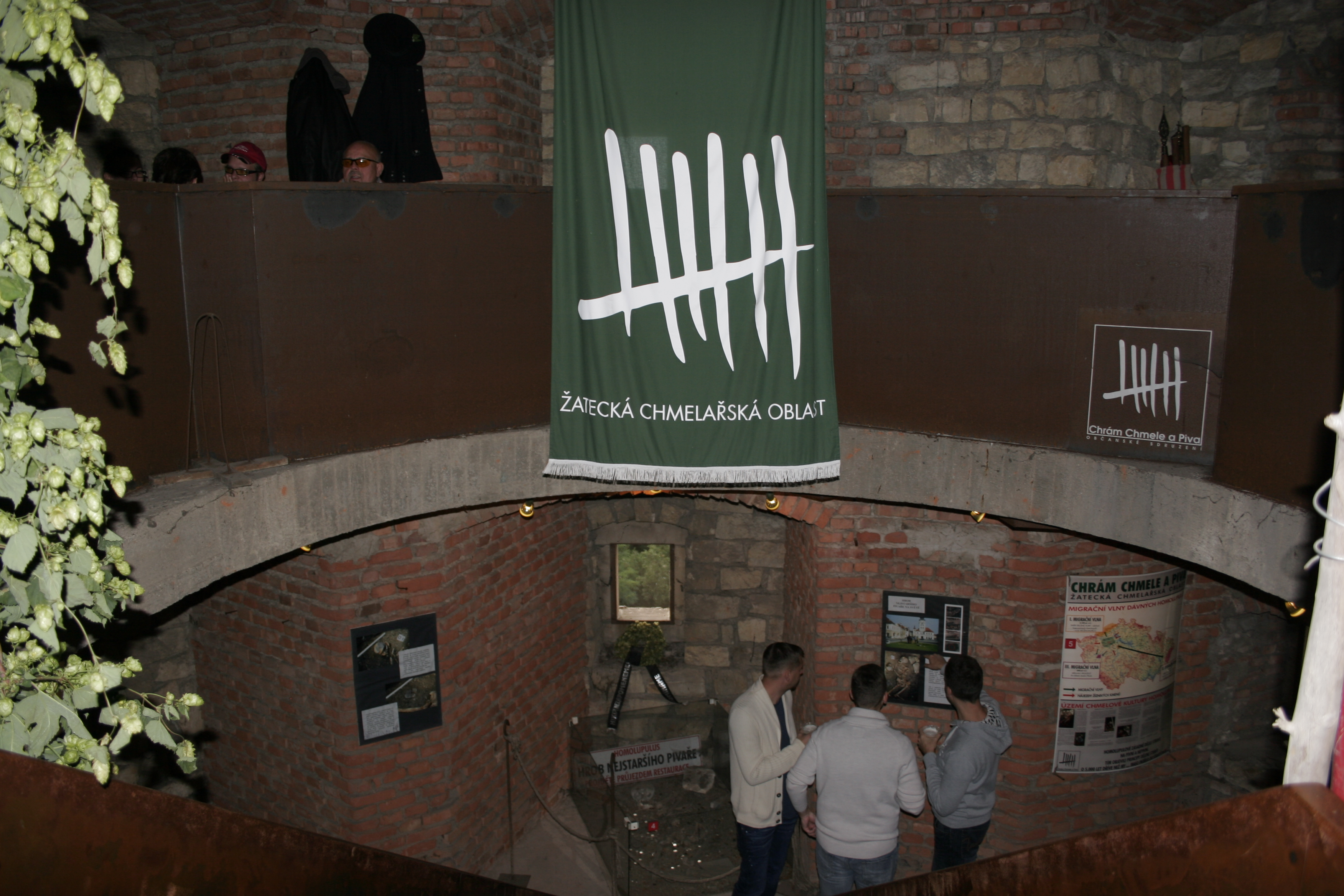 Muzeum homolupulů v Žatci. Okres Louny, Česká Republika.